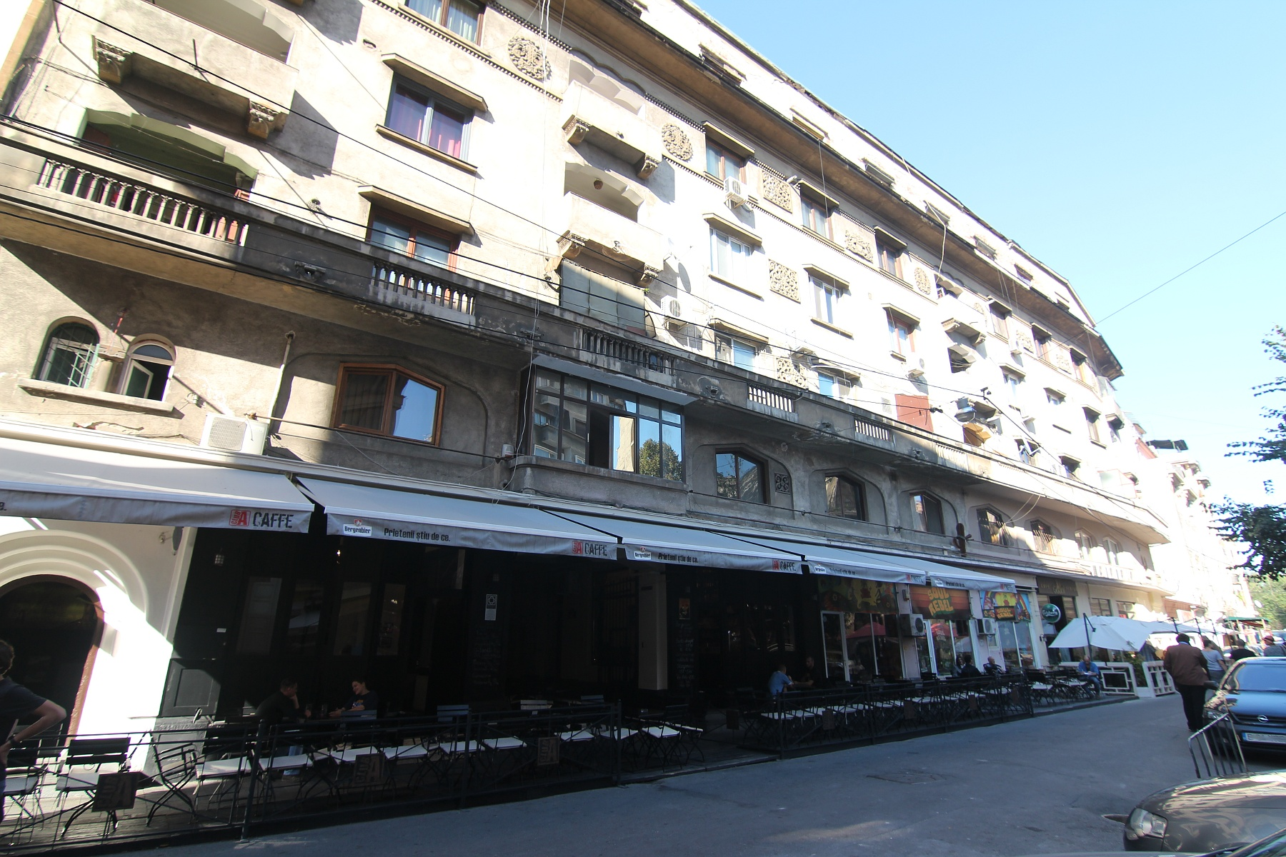 Imobil (Clubul Arhitecților)